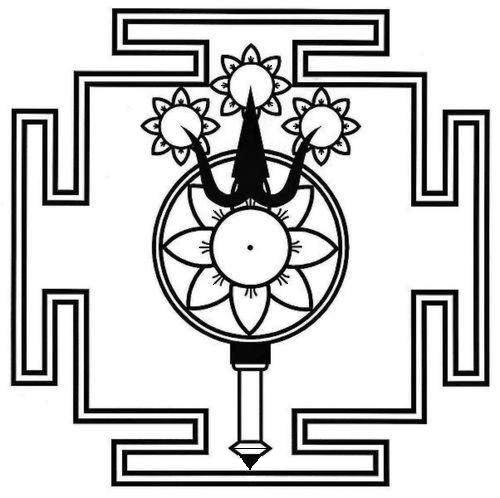 Disegno schematico del mandala triśūlābjmaṇḍala della scuola Trika (mandala del tridente e dei loti)